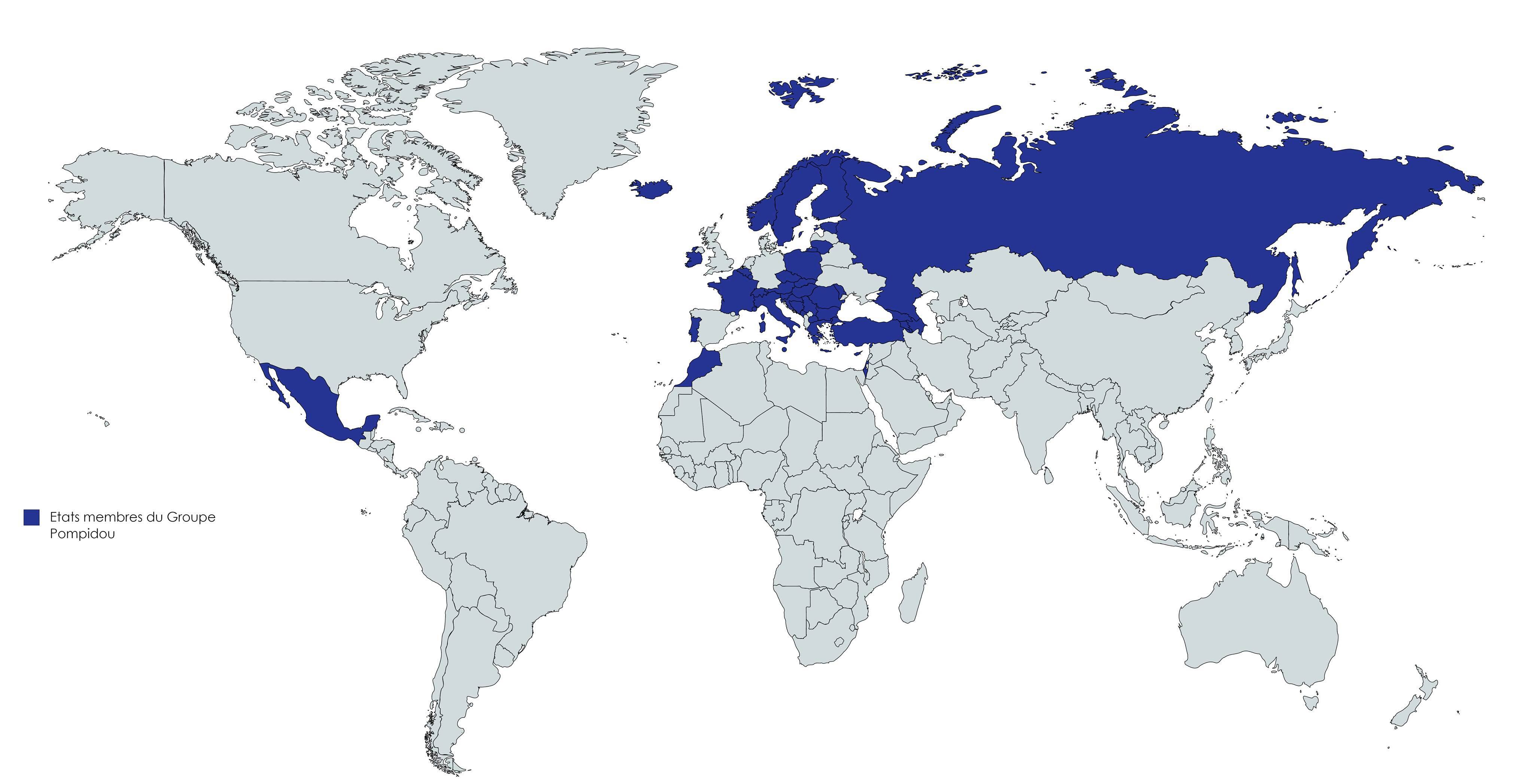 La carte représente les Etats membres du Groupe Pompidou - 41 Etats. La carte est réalisée avec le logiciel "MapChart".